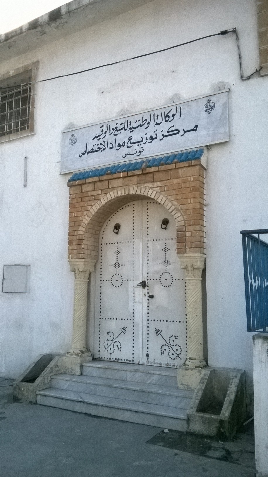 Sidi El Béchir, Tunis سيدي البشير ، تونس